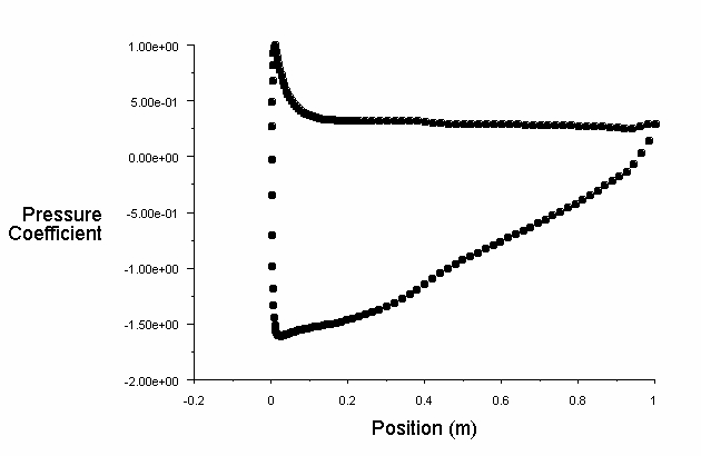 Diagramma del coefficiente di pressione su un tipico profilo alare.